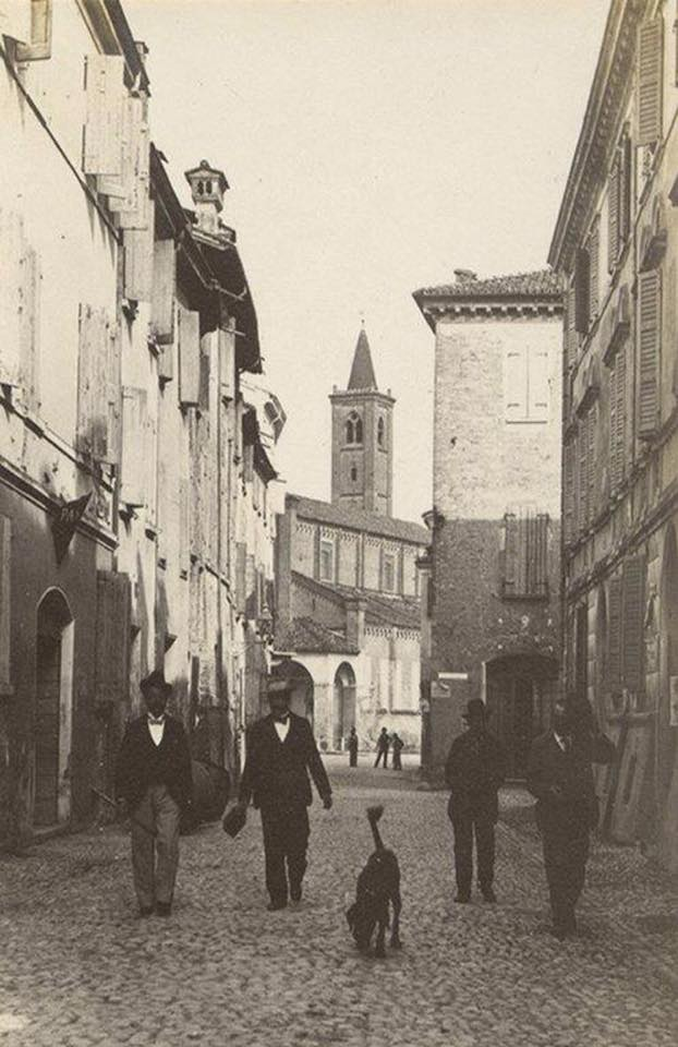 La via Volturno di Mirandola con i ciottoli e sullo sfondo la chiesa di San Francesco d'Assisi con il campanile all'inizio del XX secolo